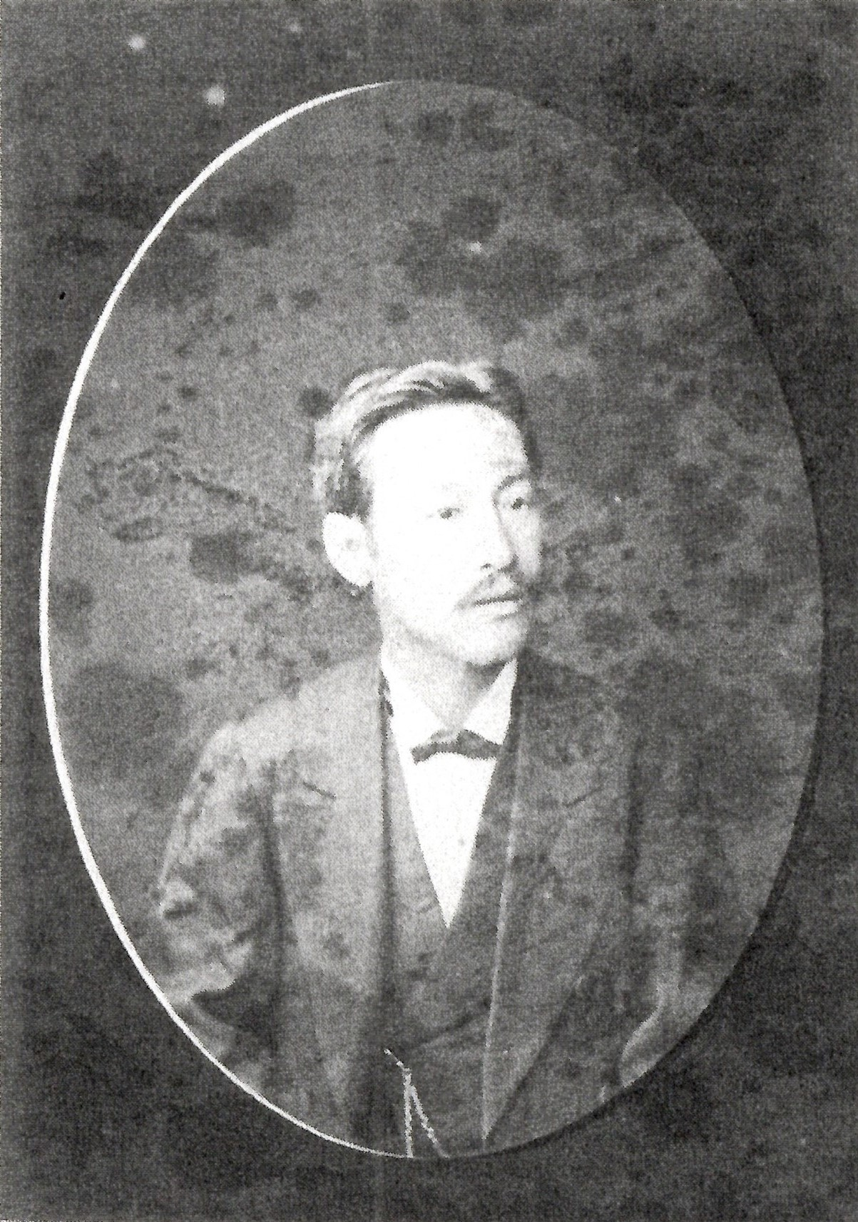 本多忠伸の肖像写真。